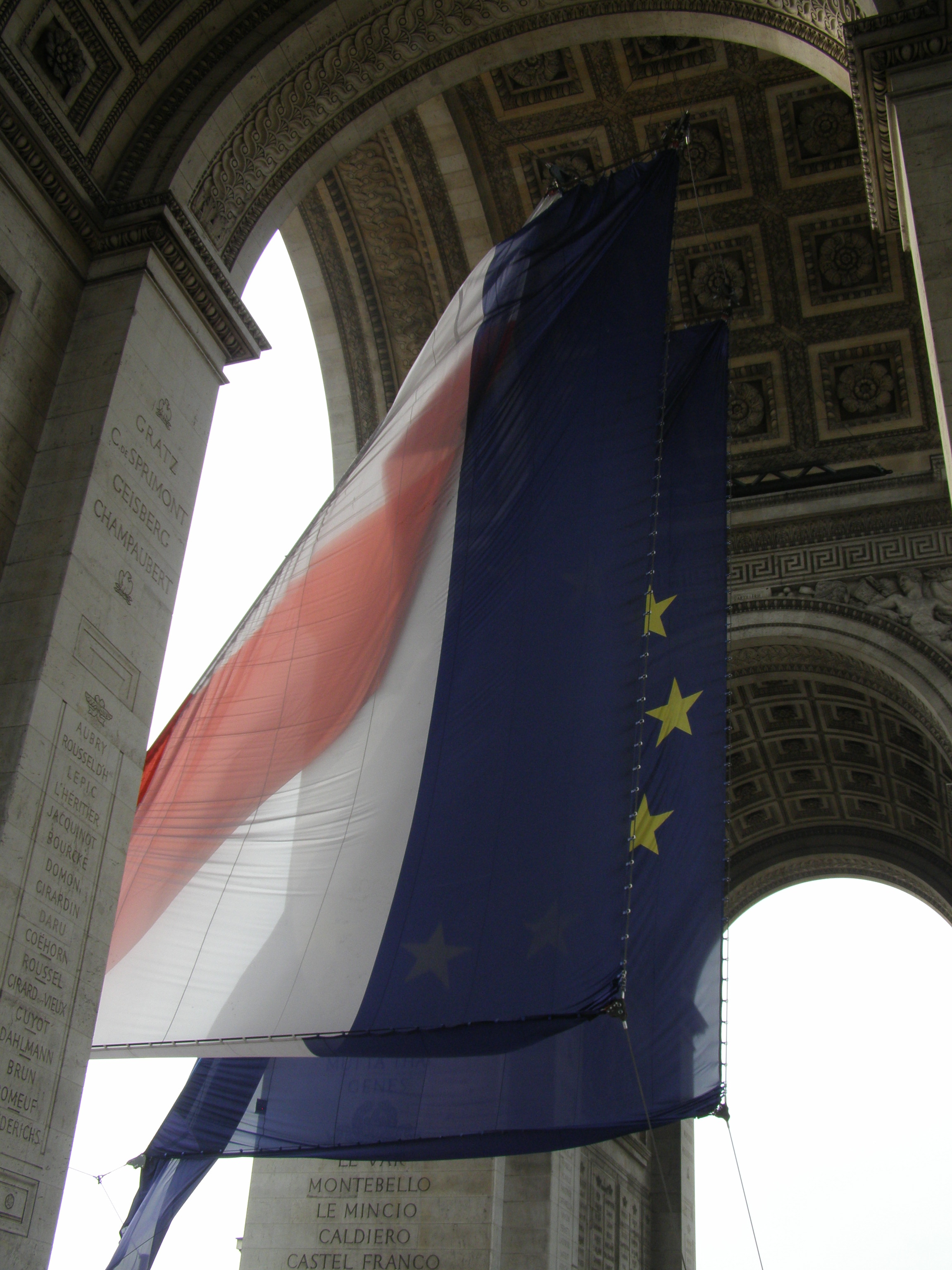 שער הניצחון מבפנים